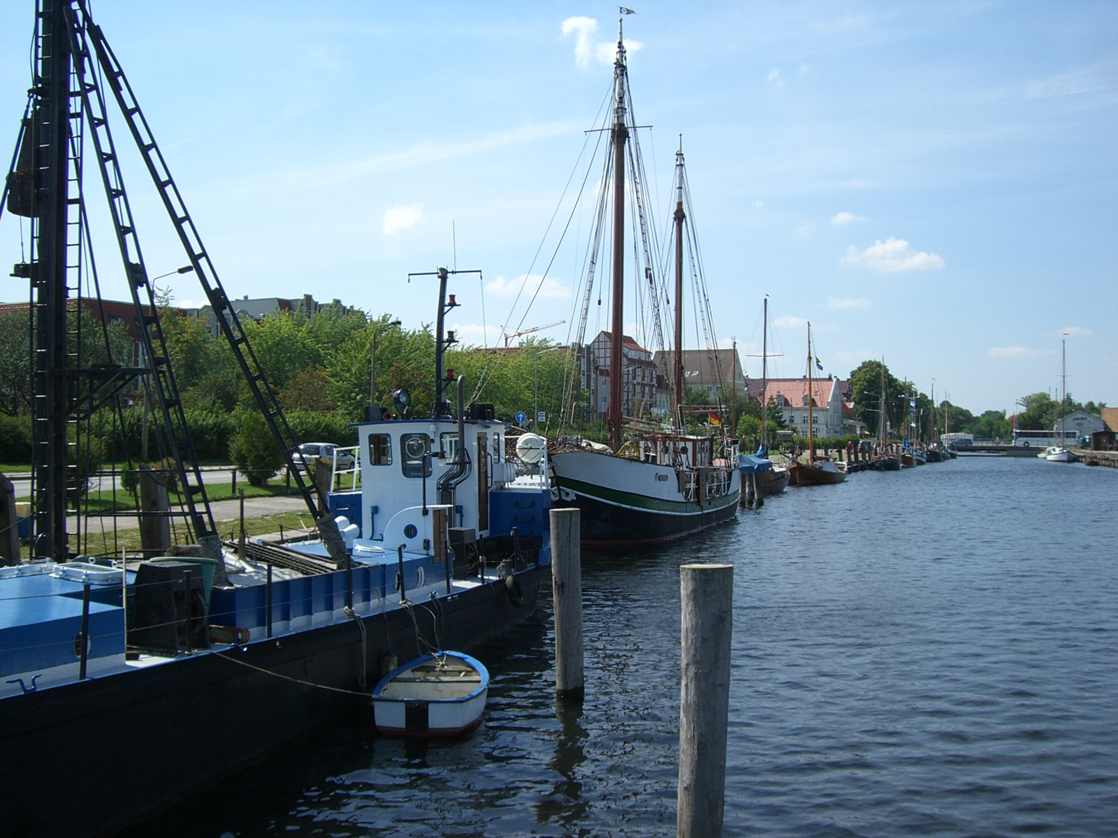 Greifswald